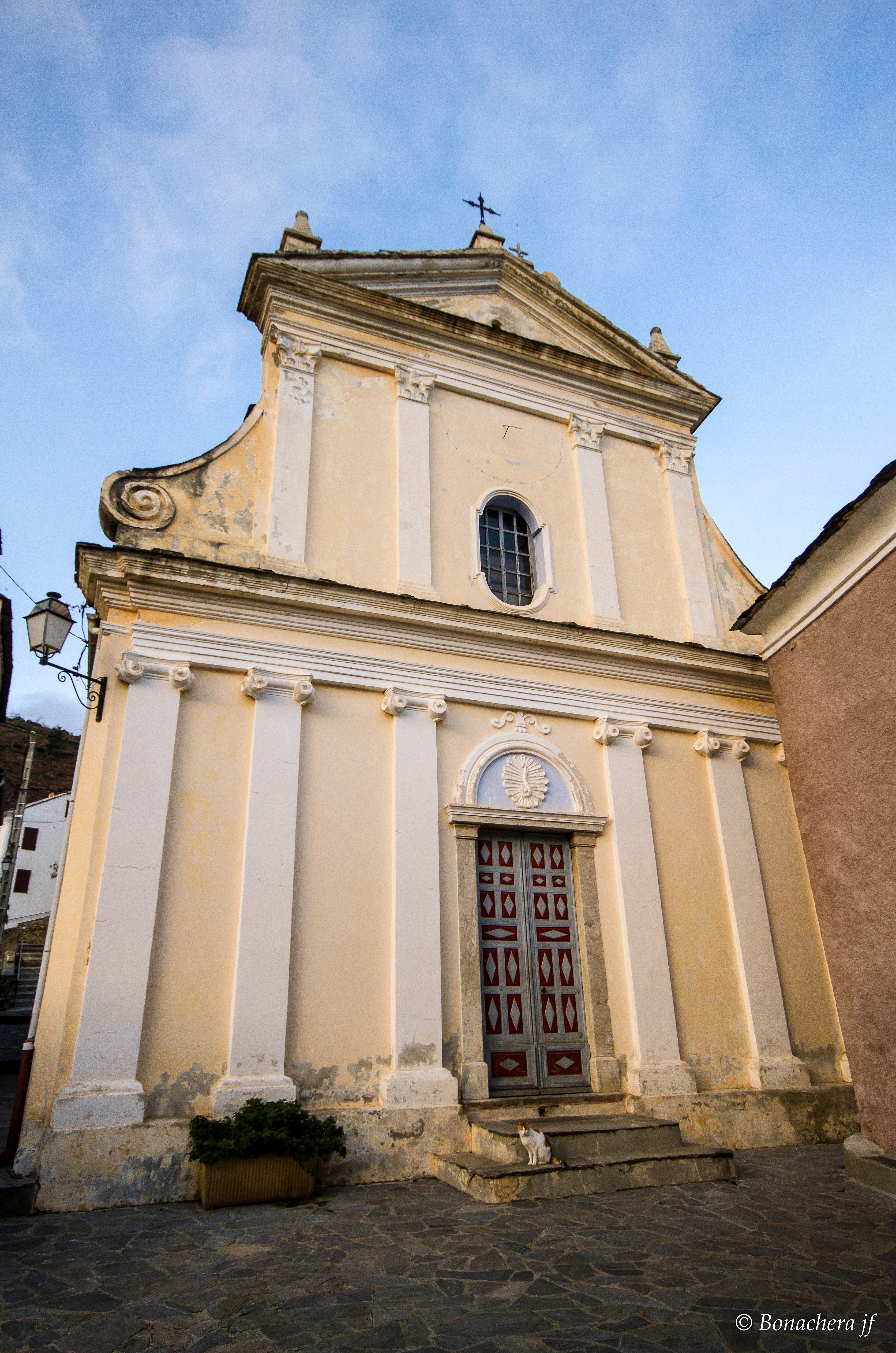 Verdèse, Castagniccia (Corse) - Entrée de l'église San Sebastianu